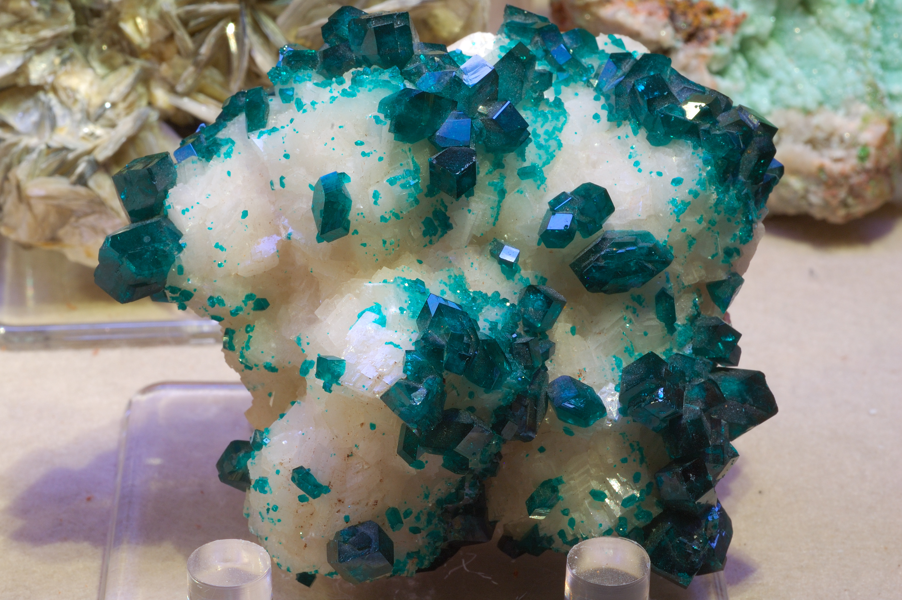 Dioptase in Calcite Matrix, Tsumeb Mine, Tsumeb, Namibia